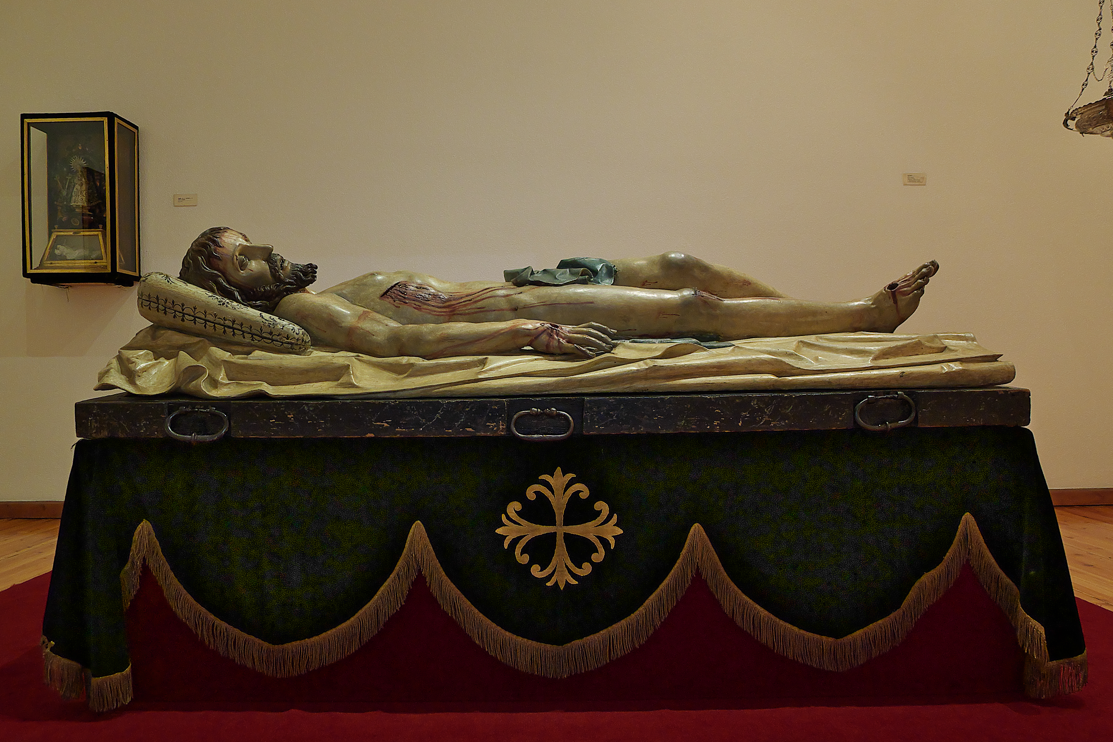 Gregorio Fernández (1631-1634). Titular de la Cofradía del Santo Entierro (Valladolid).